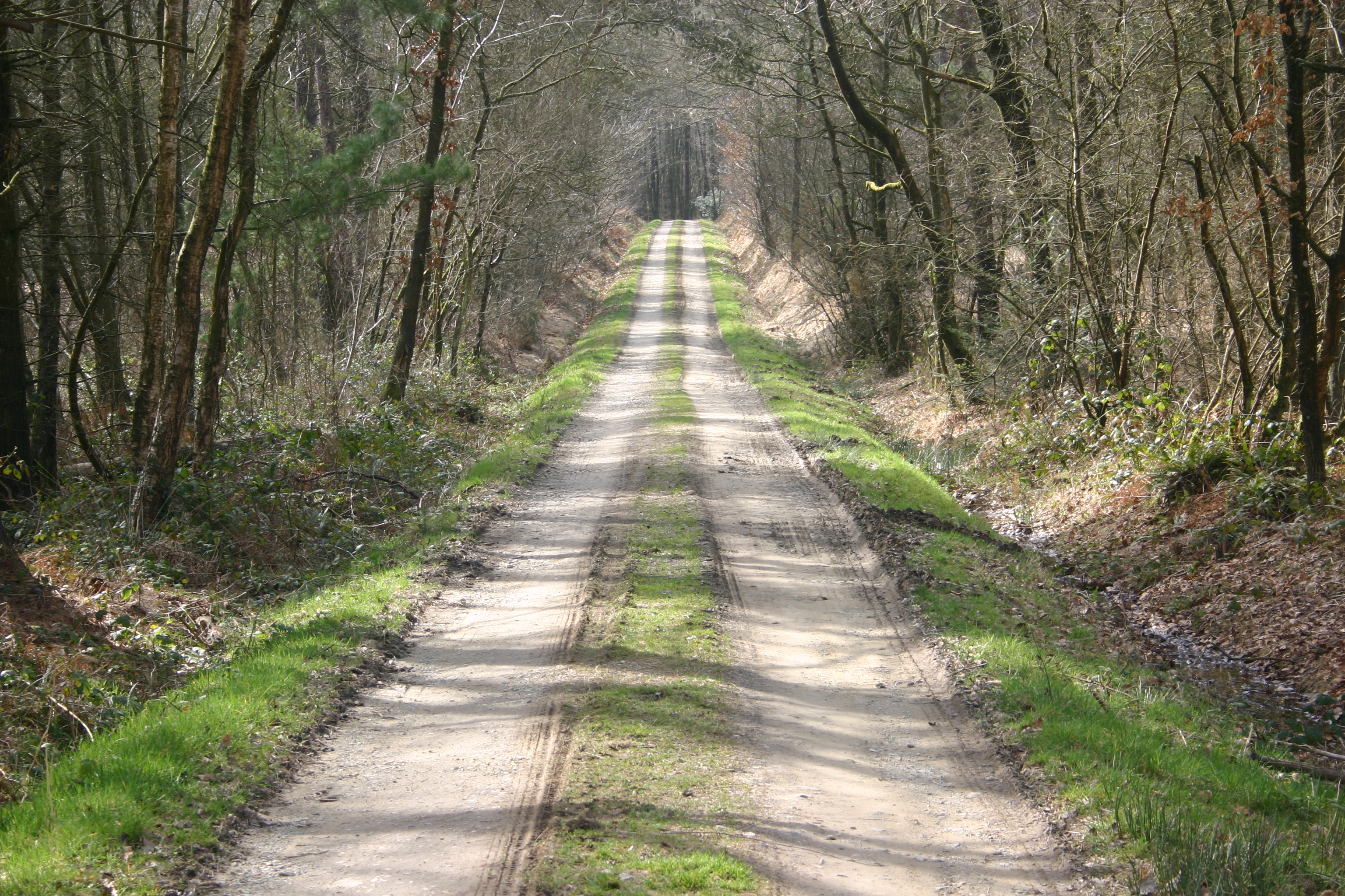 Sentier de la foret de Loudéac